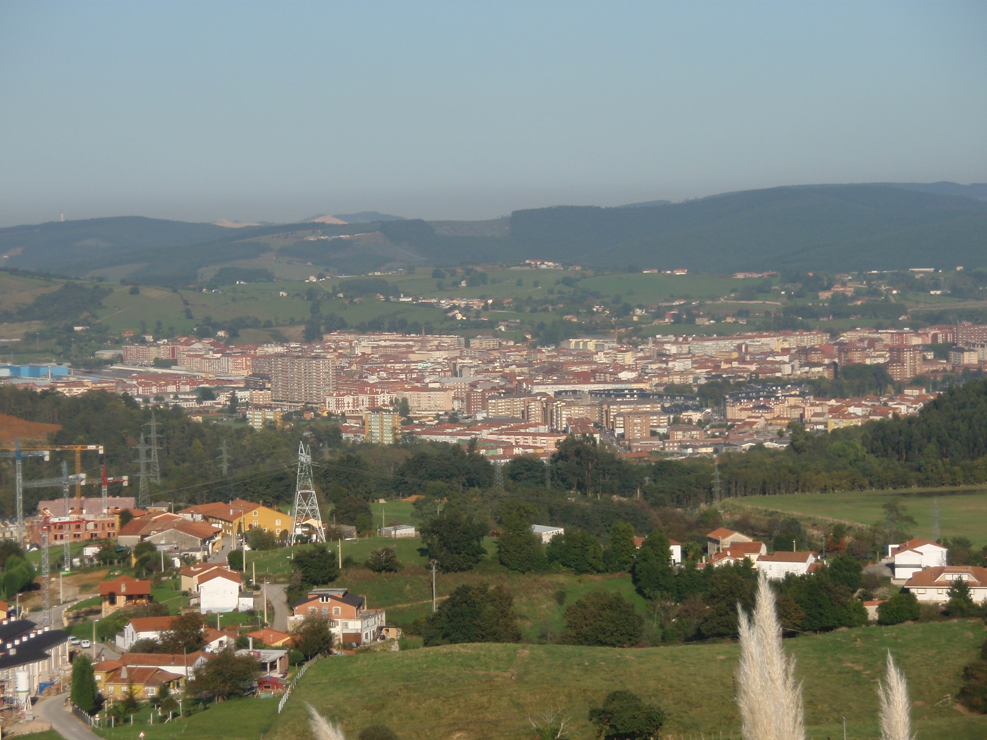 Vista de Torrelavega desde el Parque Empresarial Besaya